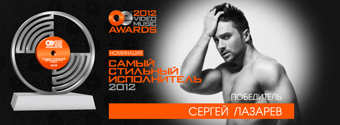 Номинация САМЫЙ СТИЛЬНЫЙ ИСПОЛНИТЕЛЬ ГОДА